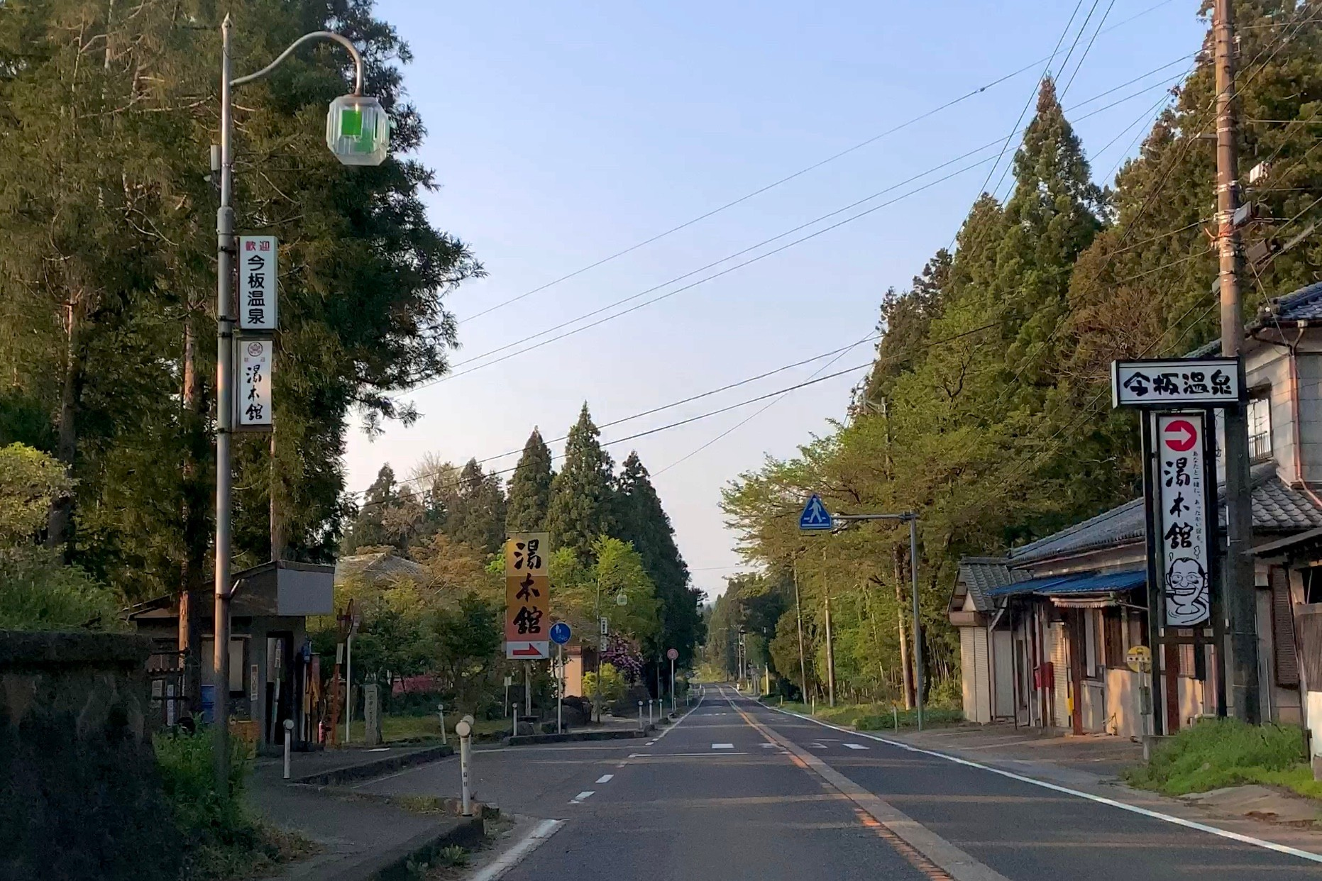 国道290号 五頭温泉郷今板温泉付近（2020年5月）温泉は右に曲がった先にある。